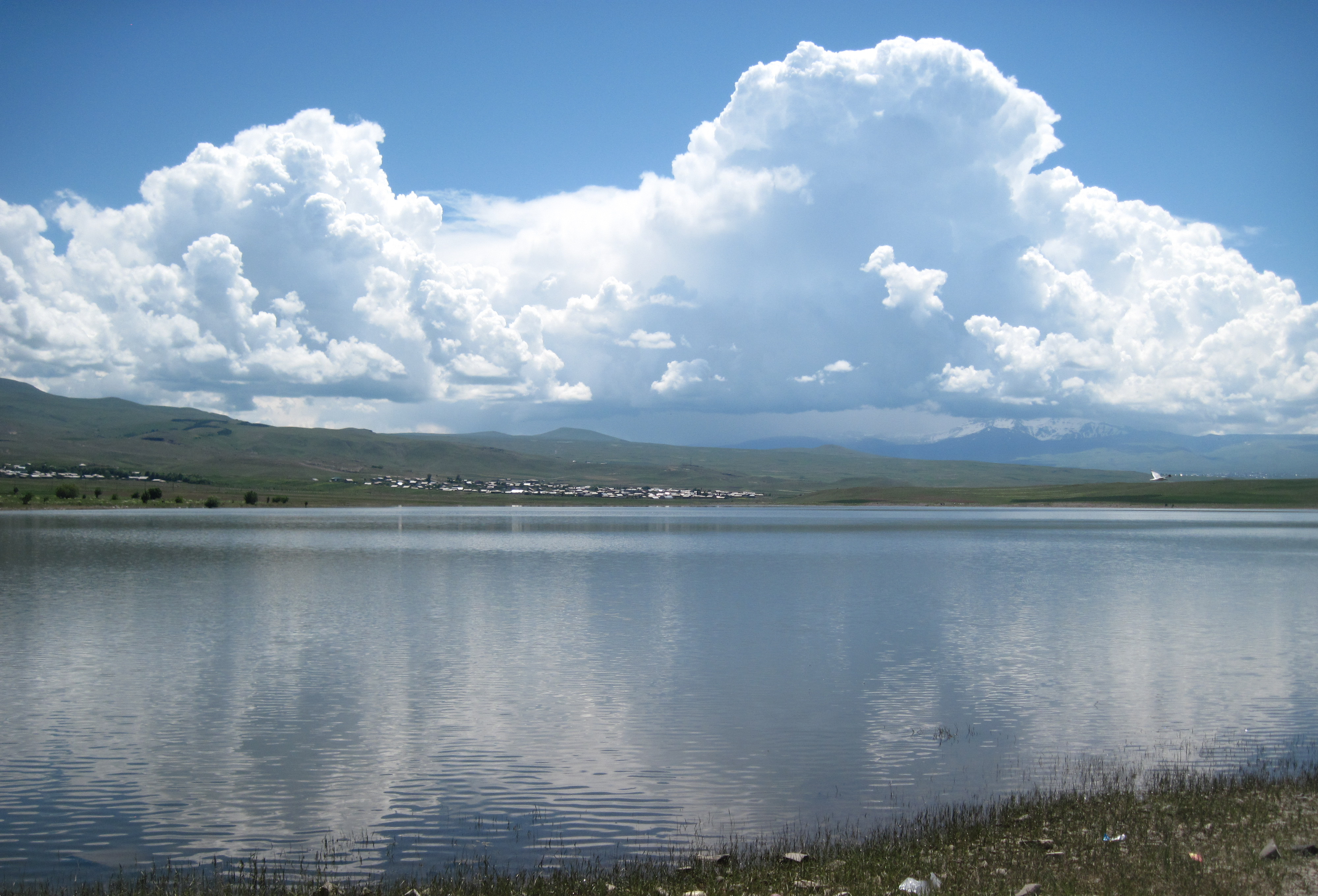 Le réservoir de village Karnut, Shirak Arménie